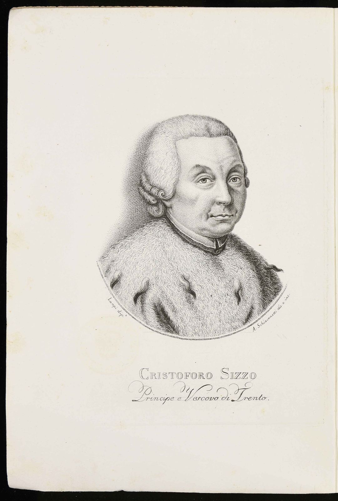 Calcografia in Giuseppe Sizzo de Noris, Memorie intorno alla famiglia tridentina dei conti Sizzo de Noris, Milano, Luigi Pirola, 1843.